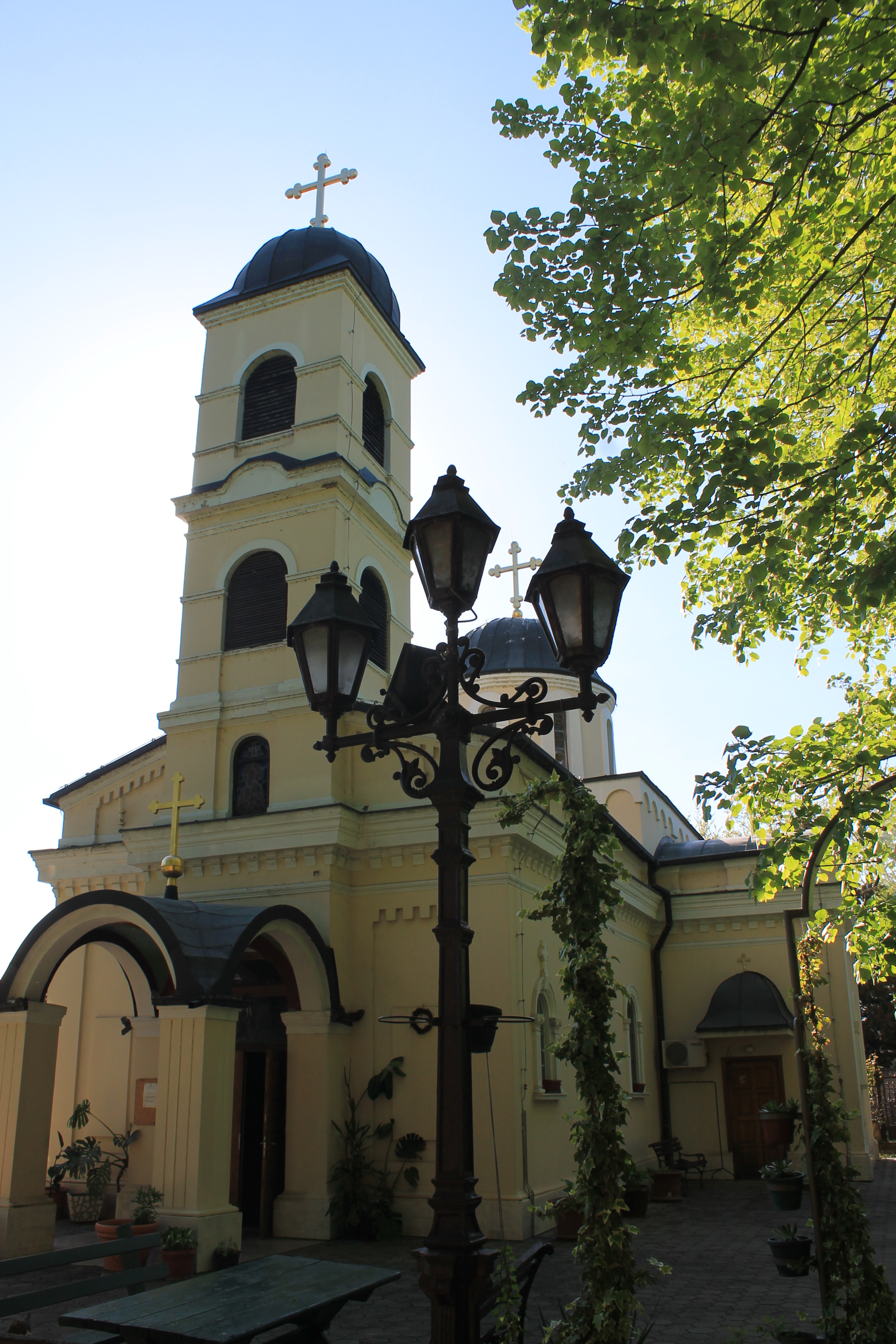 Crkva Sv. Pavla Petrovaradin